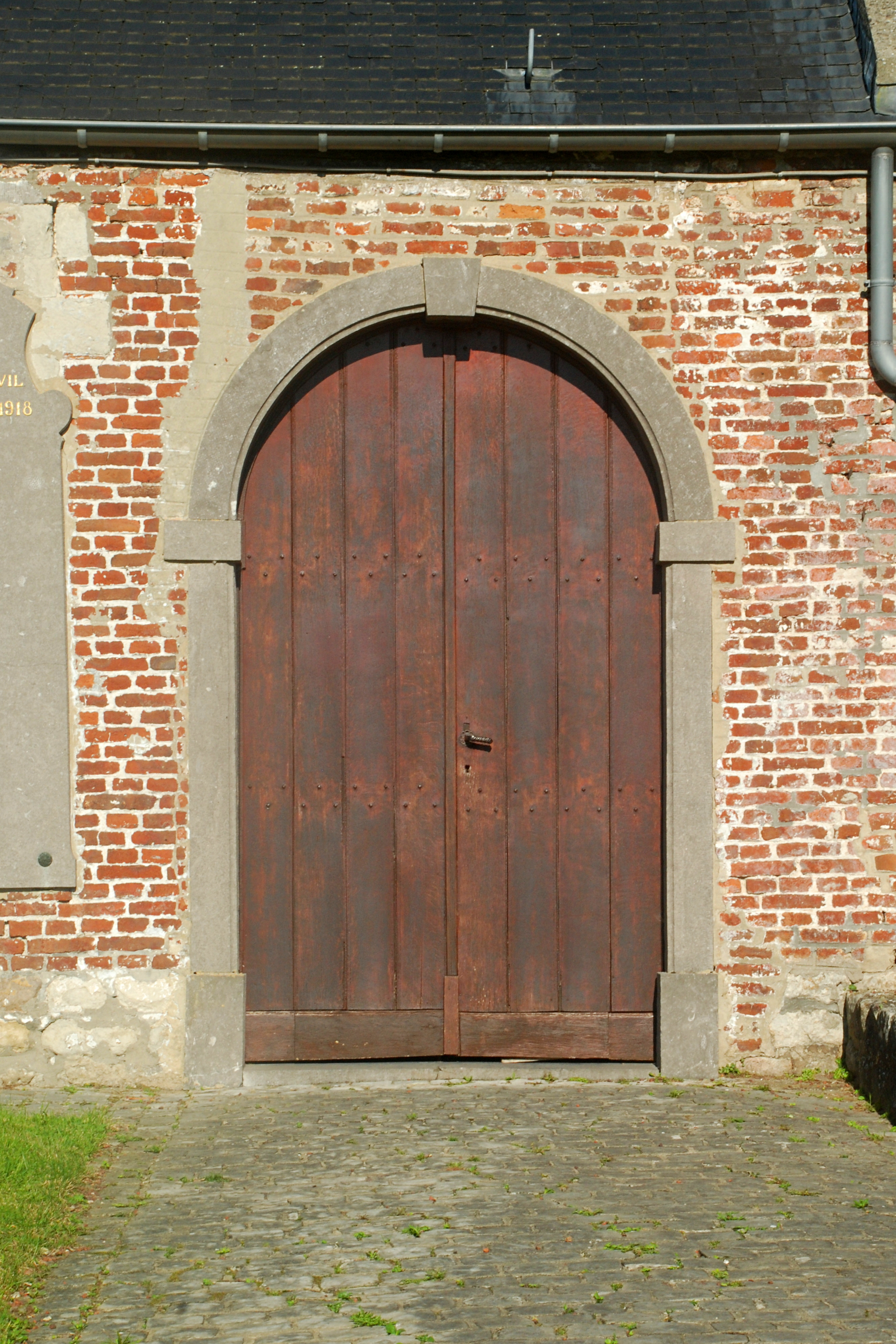 Belgique - Brabant wallon - Nivelles - Eglise Sainte-Marguerite de Thines